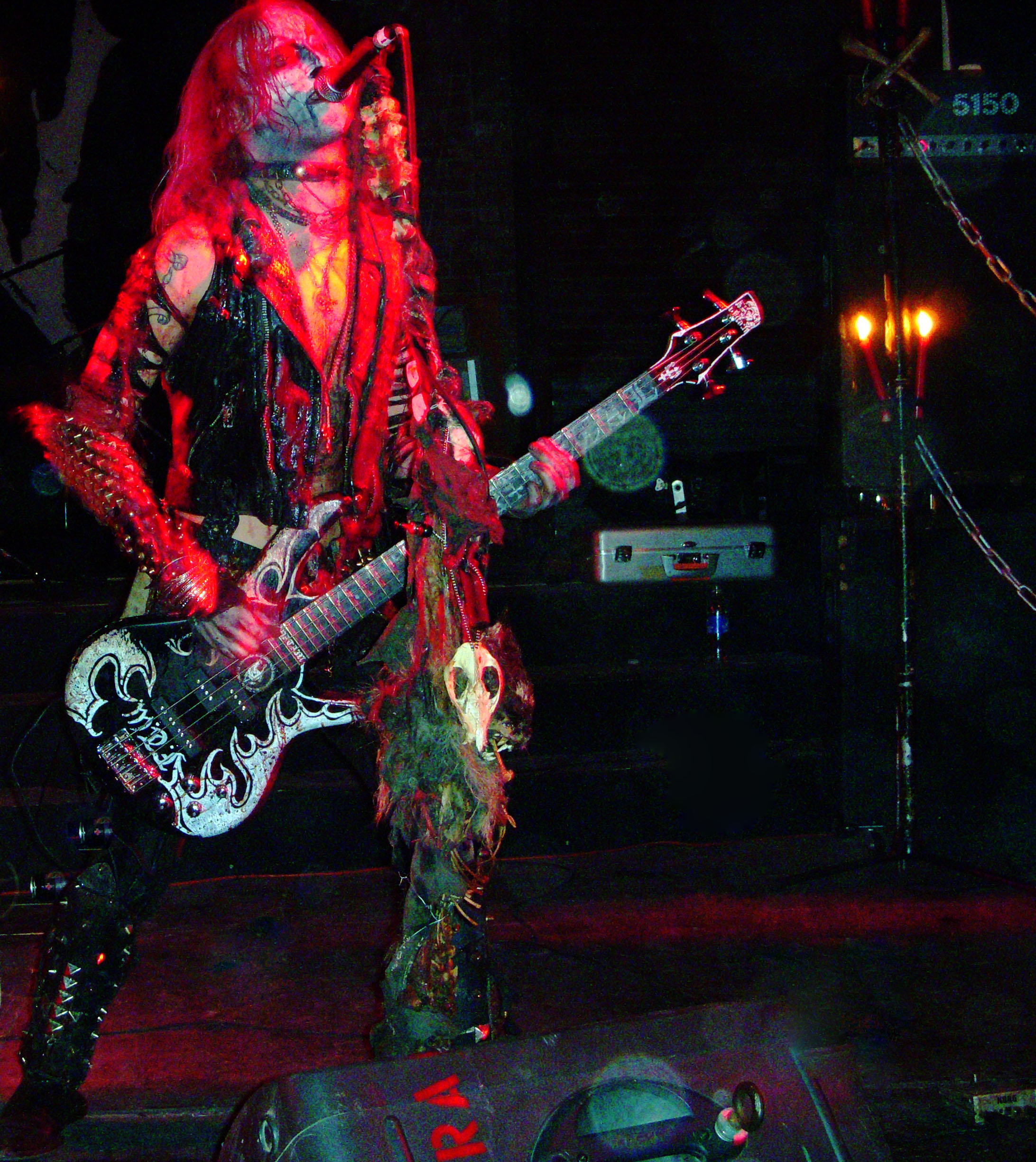 Watain black metal band